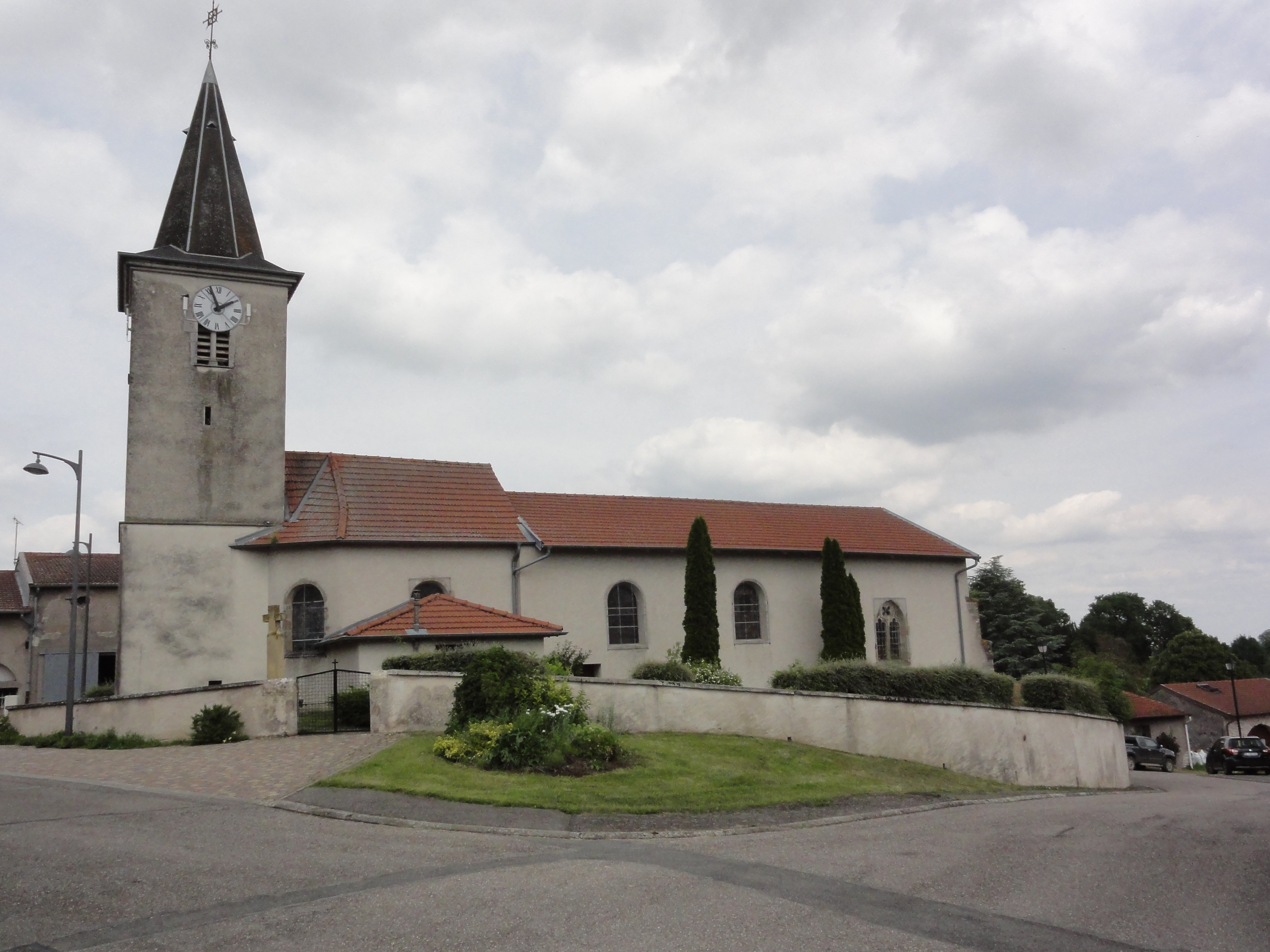 Brémoncourt (M-et-M) église churches in Meur